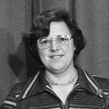 Uit de bron: Groepsportret van het College van Burgemeesters en Wethouders van de gemeente Utrecht, met staande van links naar rechts loco-secretaris J. Berger, dr. J. Rosenberg, mevr. W. Velders-Vlasblom, mr. S. Torensma en A. van Hassel (wethouders) en zittende van links naar rechts mr. A. Bransen, W.J. Vergeer (wethouders), burgemeester H.J.L. Vonhoff, gemeentesecretaris B. Burger en wethouder C. Pot.